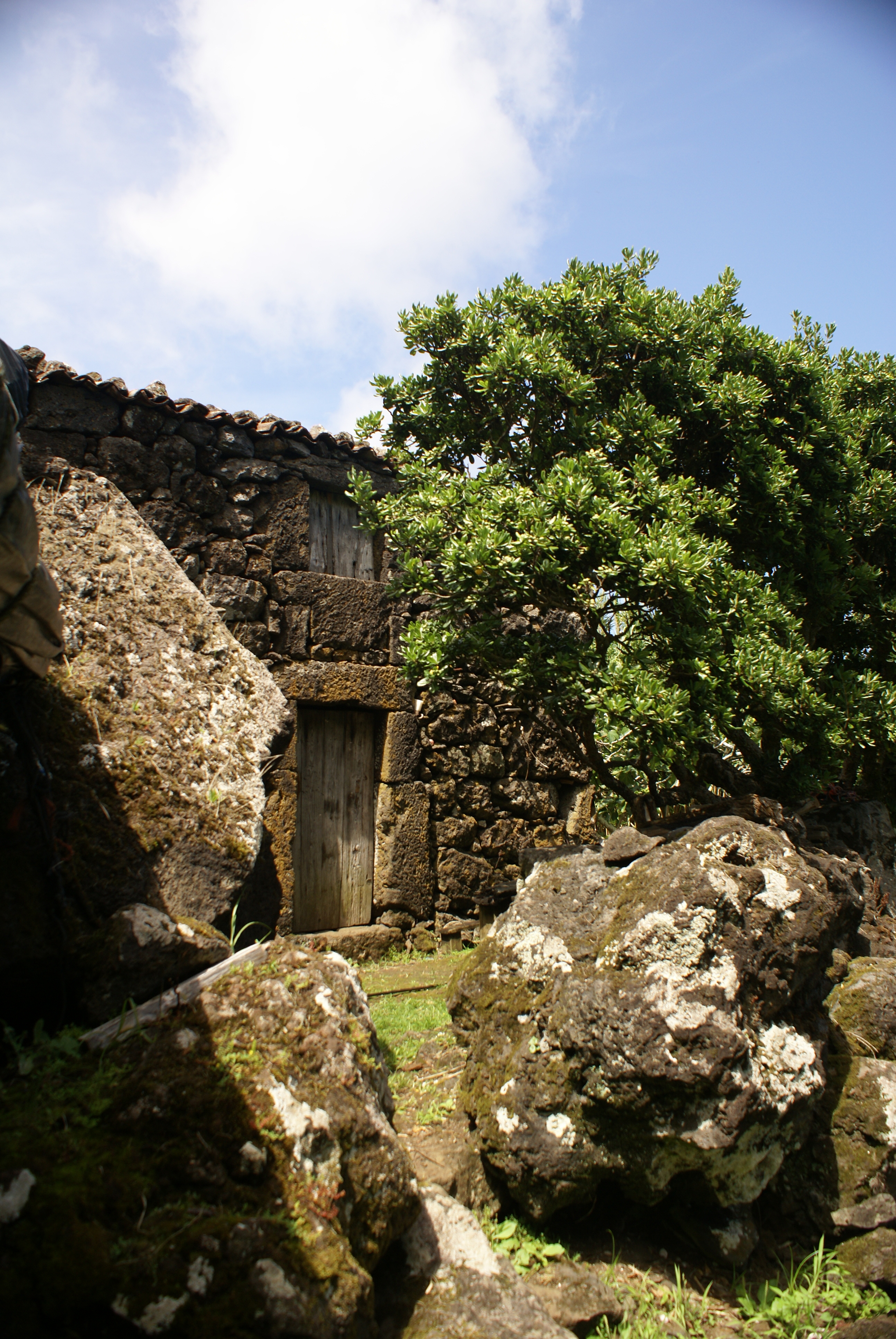 Adega centenária e típica da Fajã do Meio, atenção ao trabalho de cantaria, pertencente a João dos Santos Bettencourt, na Fajã do Meio, Velas, ilha de São Jorge